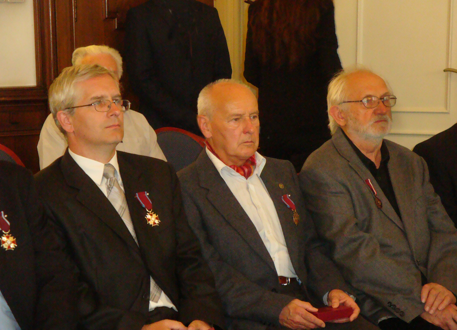 Odznaczeni łodzianie, 28 czerwca 2016 społecznicy Krzysztof Góra, Jan J. Zienkiewicz, Włodzimierz Rudnicki